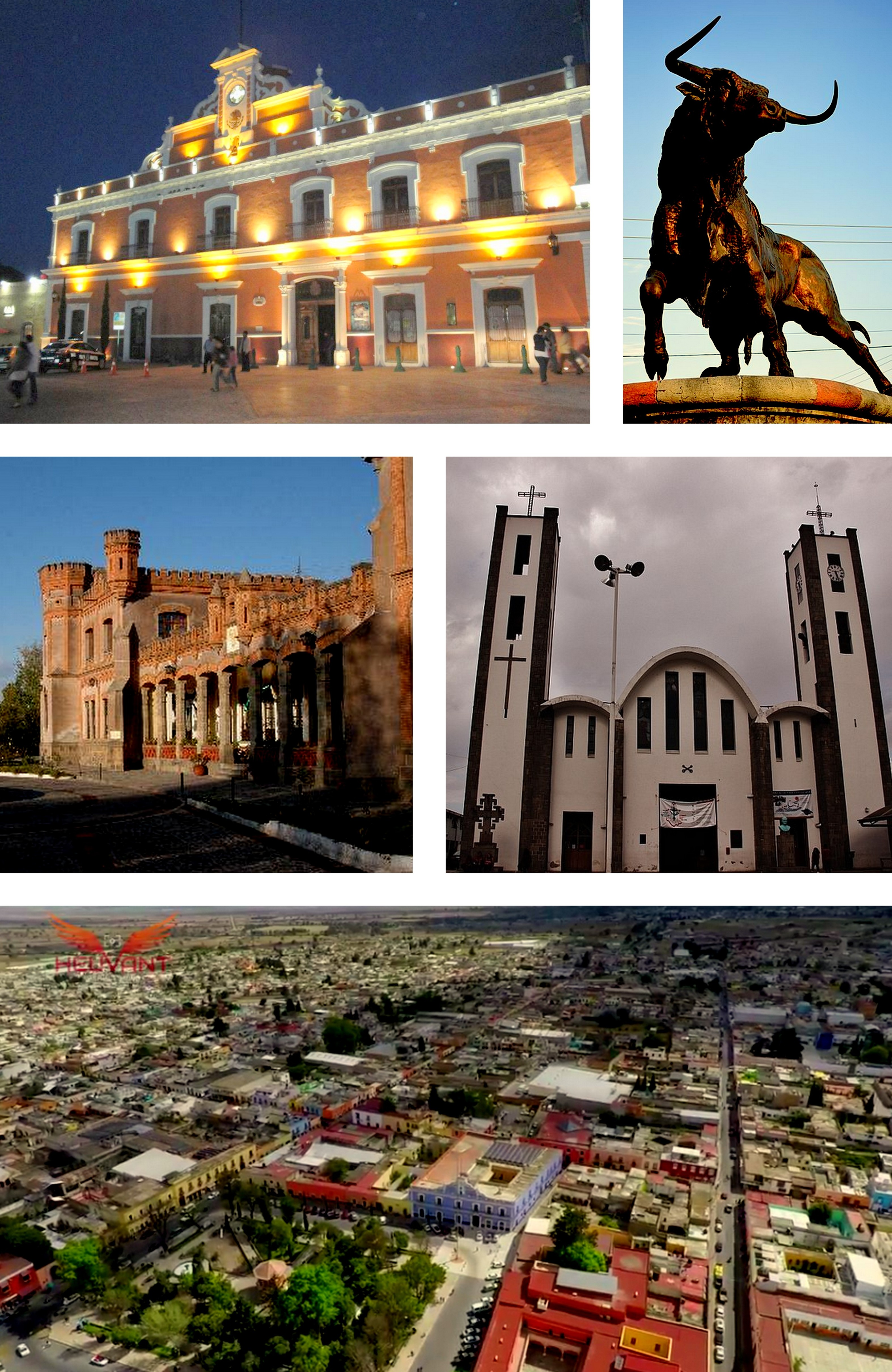 Montaje creado a partir de cinco imágenes en Wikimedia Commons: File:Basilica Nuestra Señora de la Caridad.jpg File:Huamantla skyline.png File:MonumentoToroBravoHuamantla 02.JPG File:Hacienda de Soltepec .jpg File:Palacio municipal de Huamantla .jpg